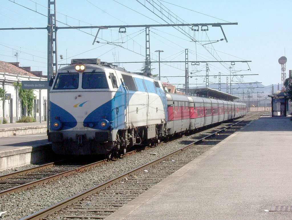 Estación de Miranda de Ebro: la locomotora 333.203 de Renfe Operadora haciendo un servicio Talgo III, servicio ya extinto.